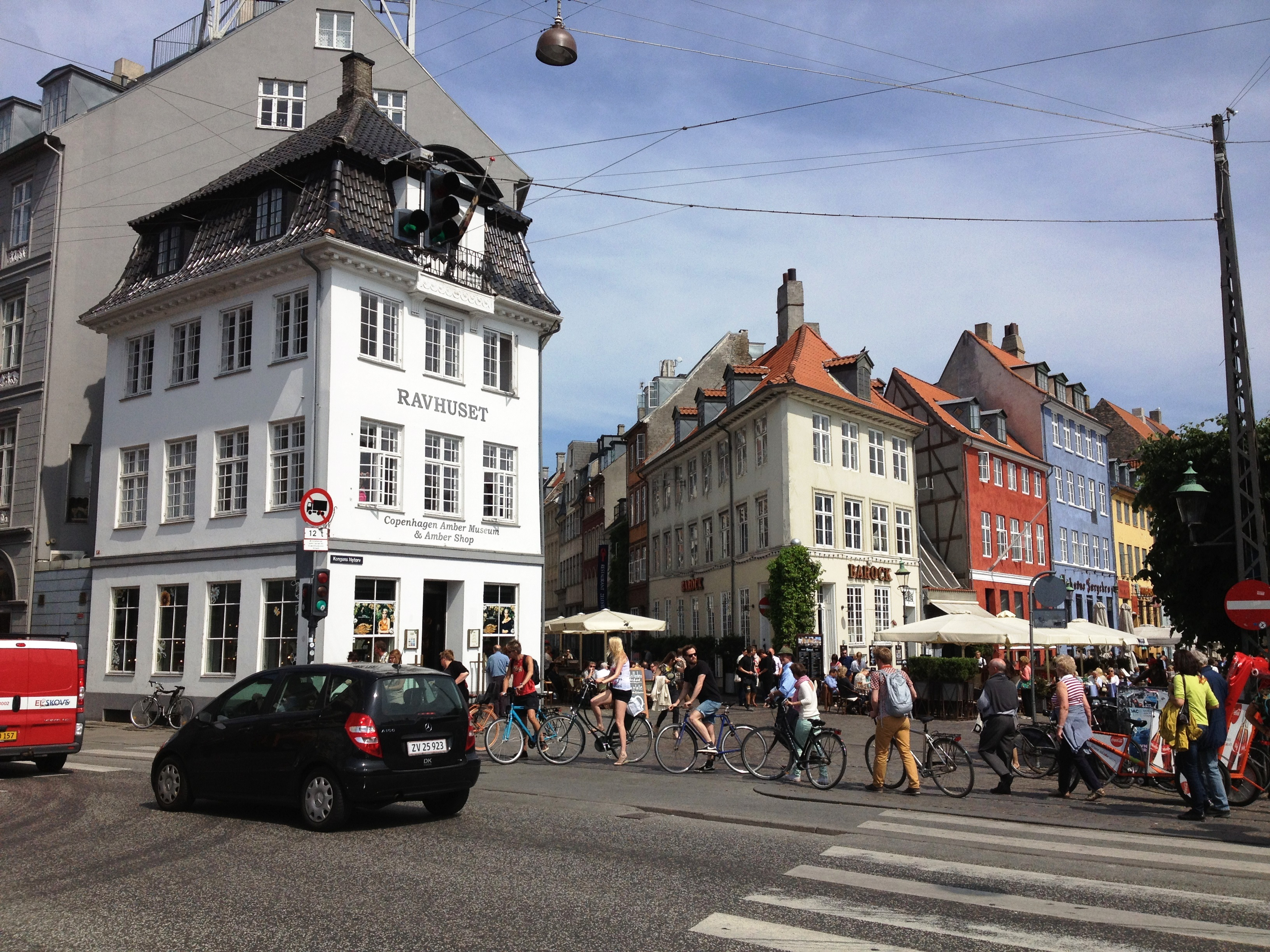 The Amber Museum in Copenhagen, Denmark